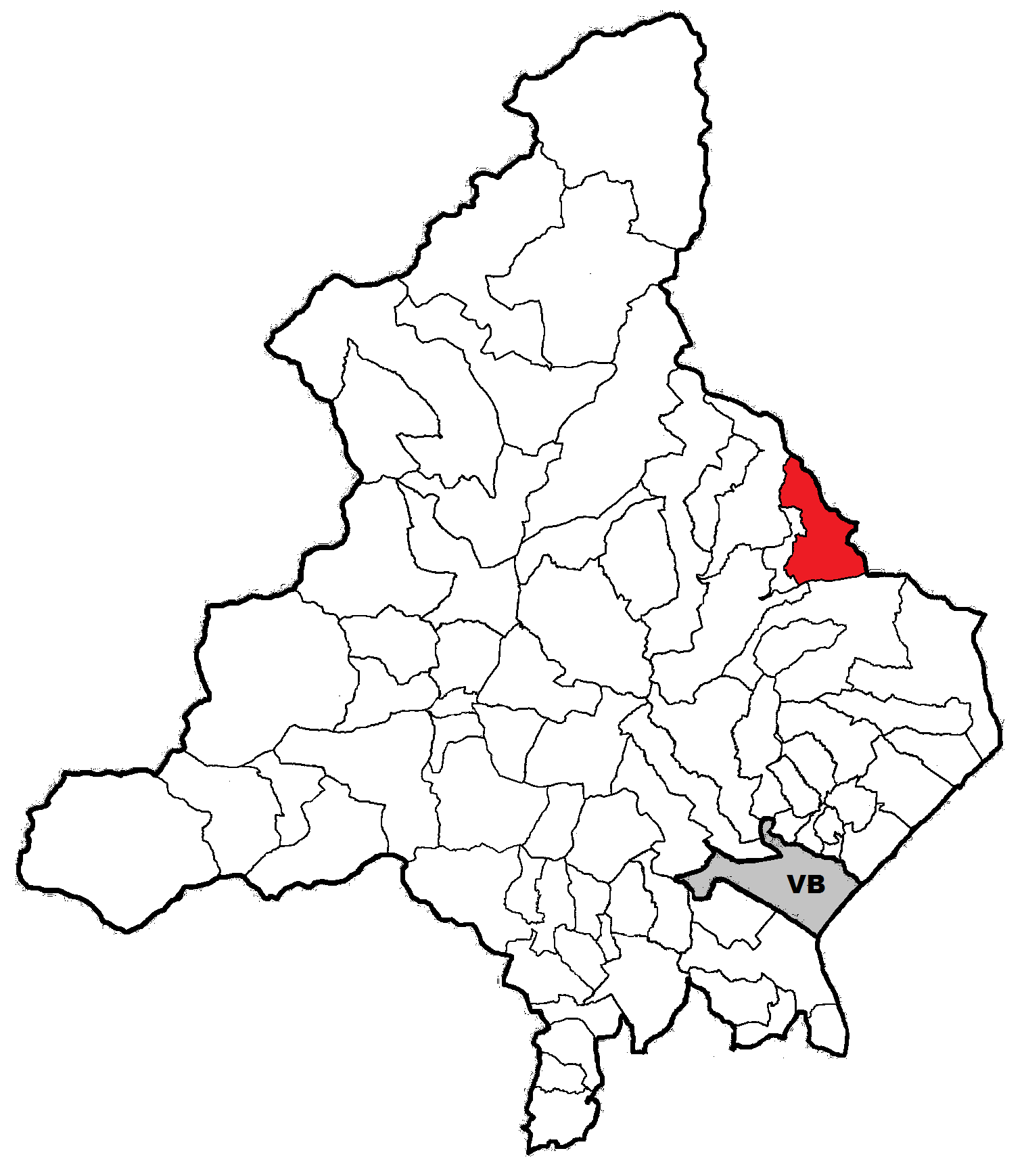 Posizione del comune nella provincia del Verbano-Cusio-Ossola